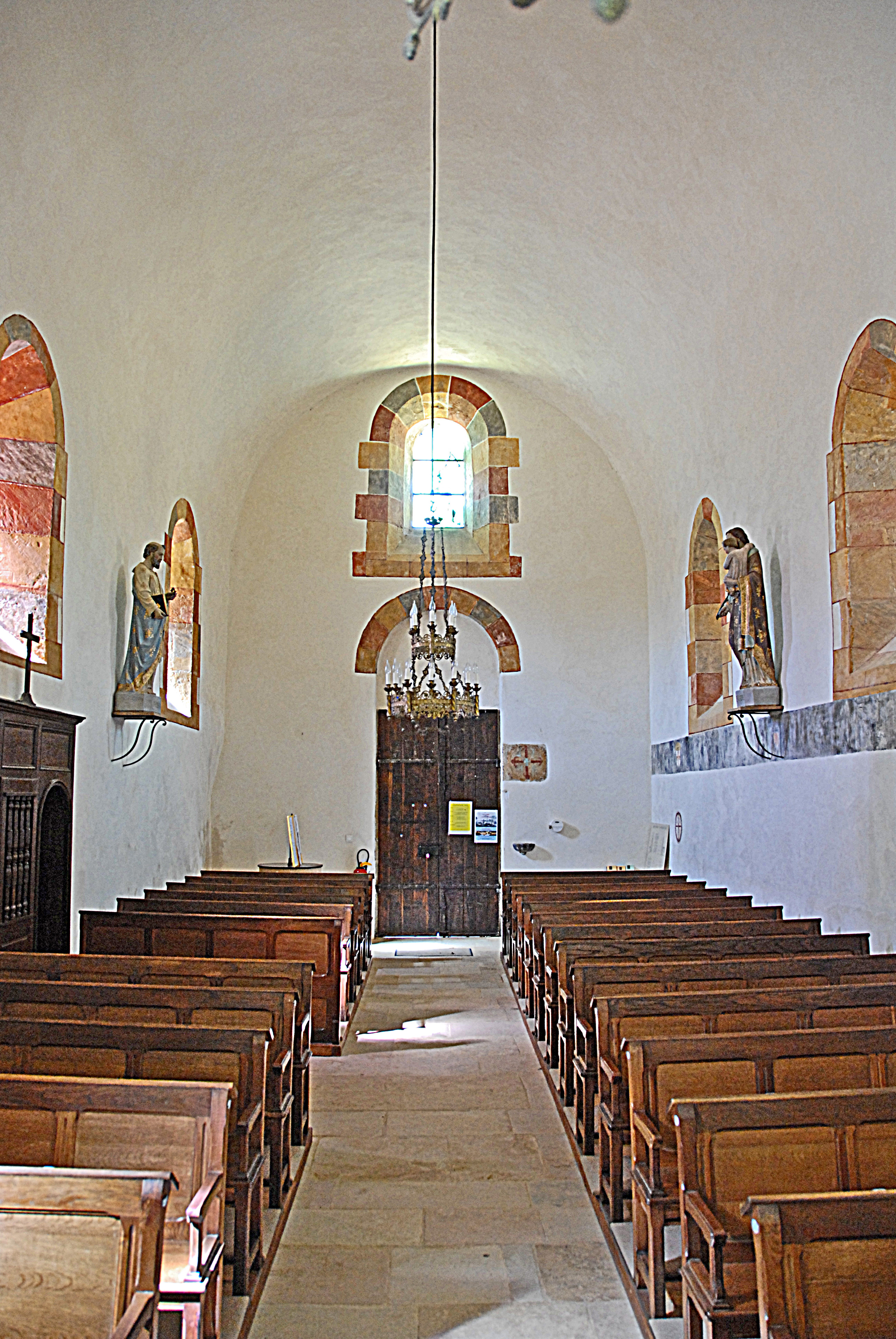 Sts-Pierre-et-Paul de Montceaux-l'Étoile, Schiff nach hinten